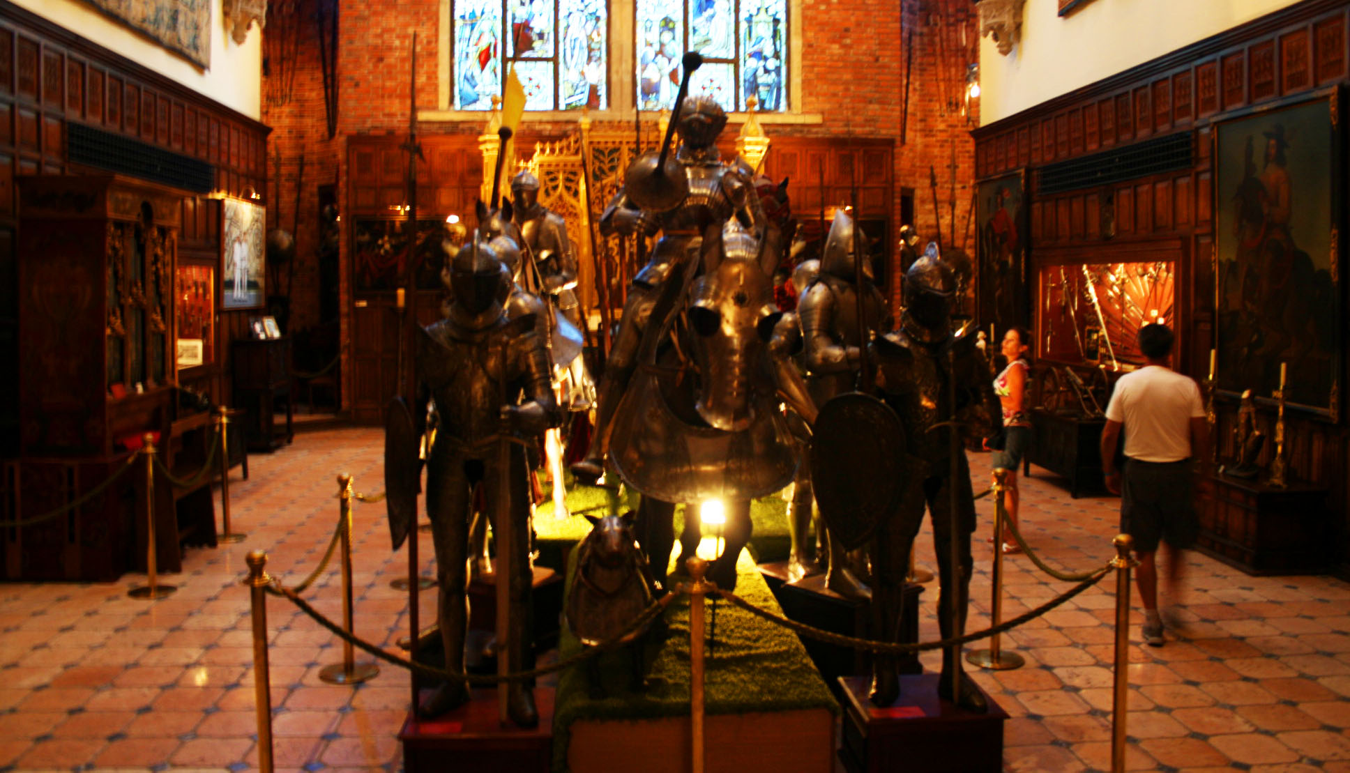 Instituto Ricardo Brennand - Recife - Pernambuco - Brasil